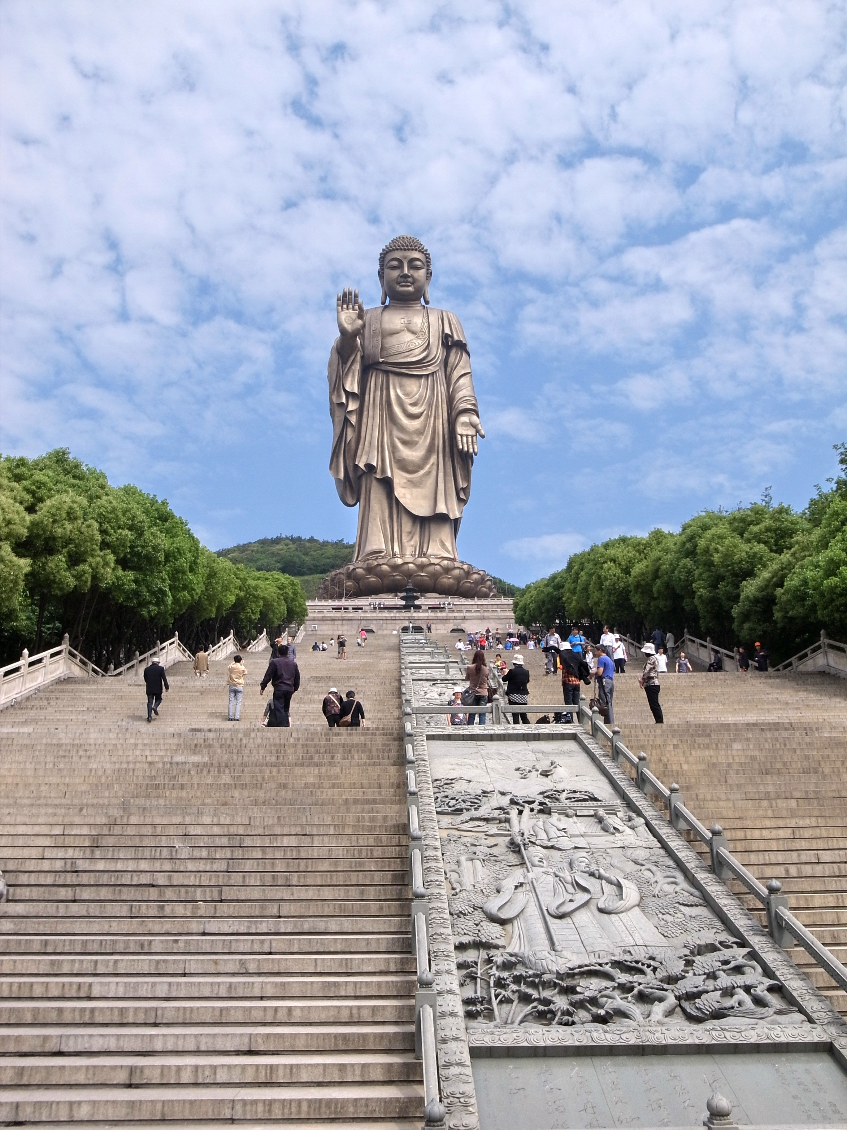 灵山大佛